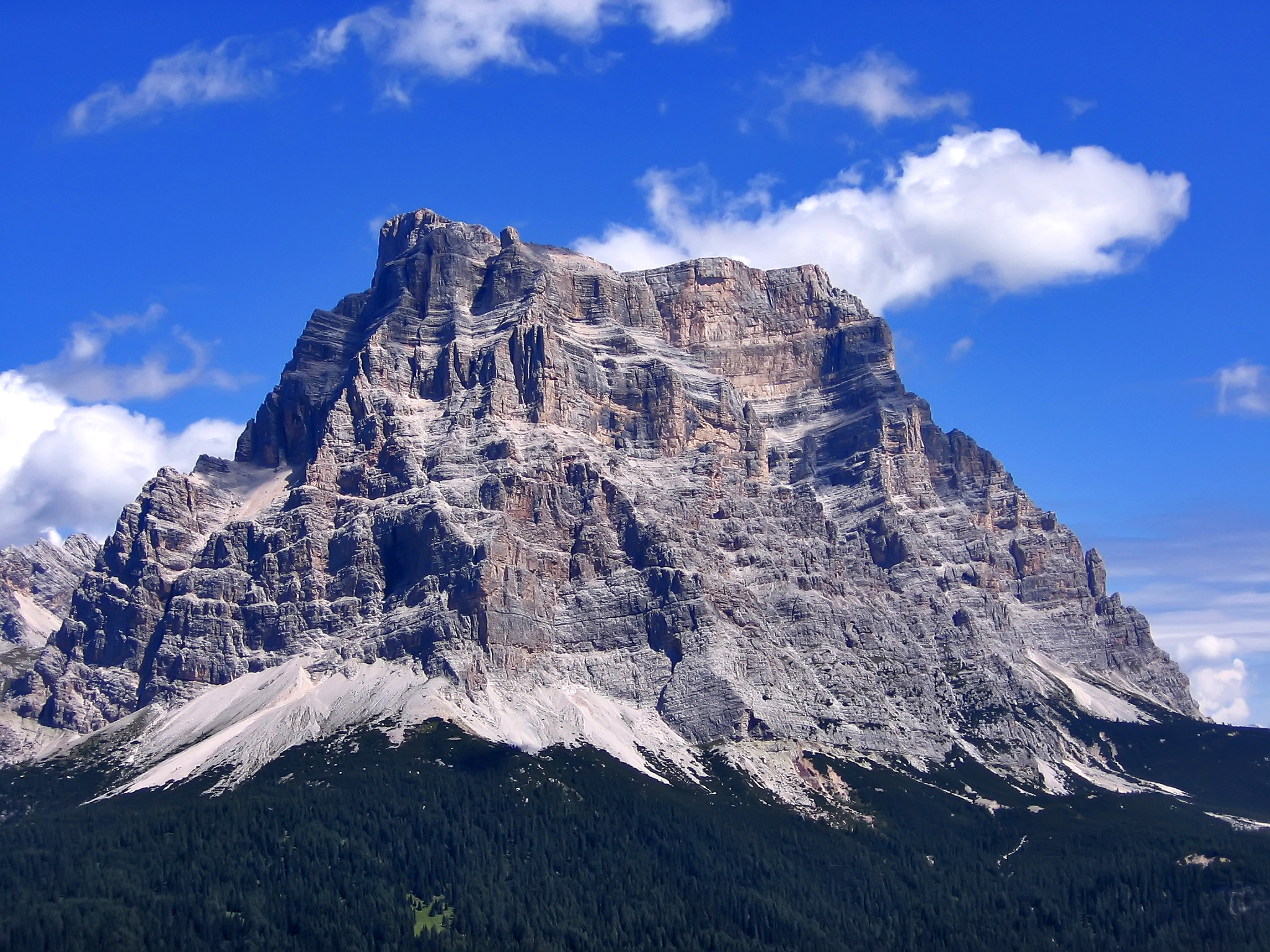 Il monte Pelmo visto dal sentiero 564